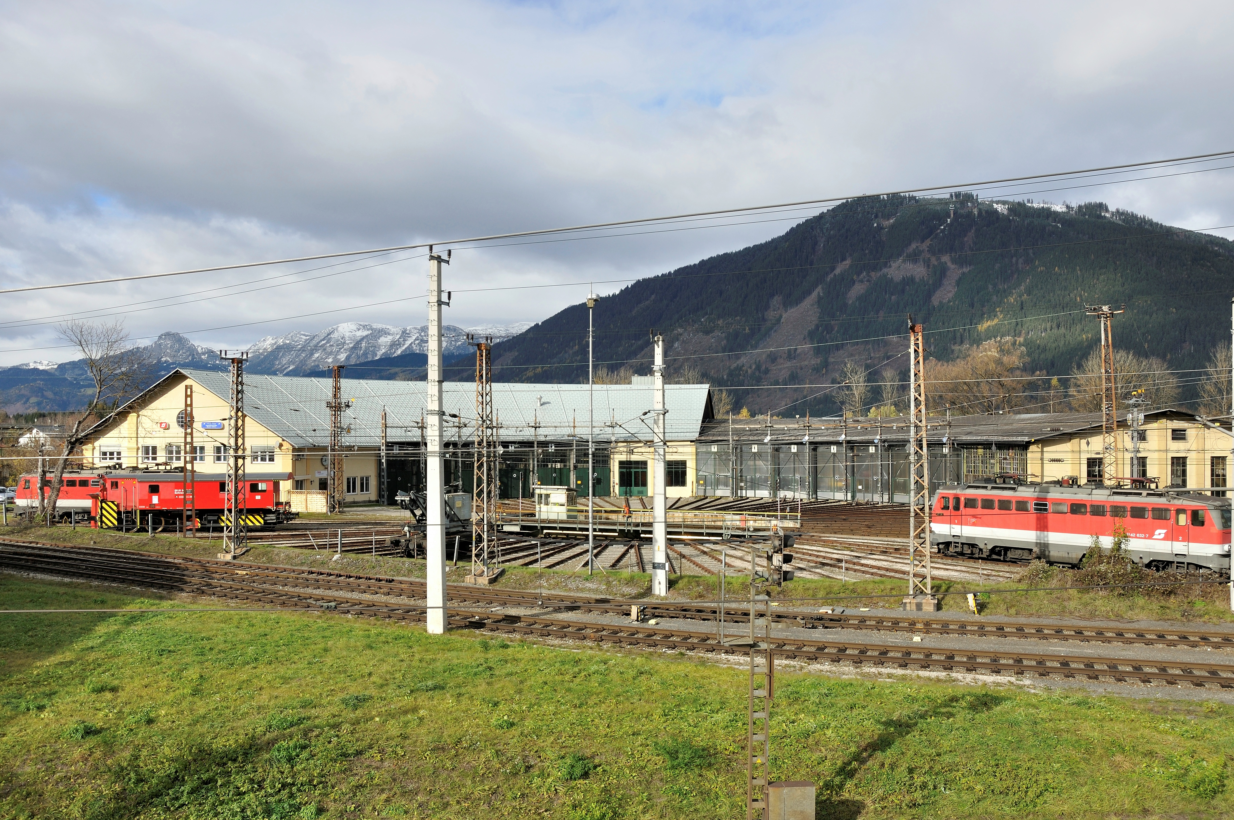 Rundlokschuppen mit Drehscheibe des Bahnhofes Selzthal